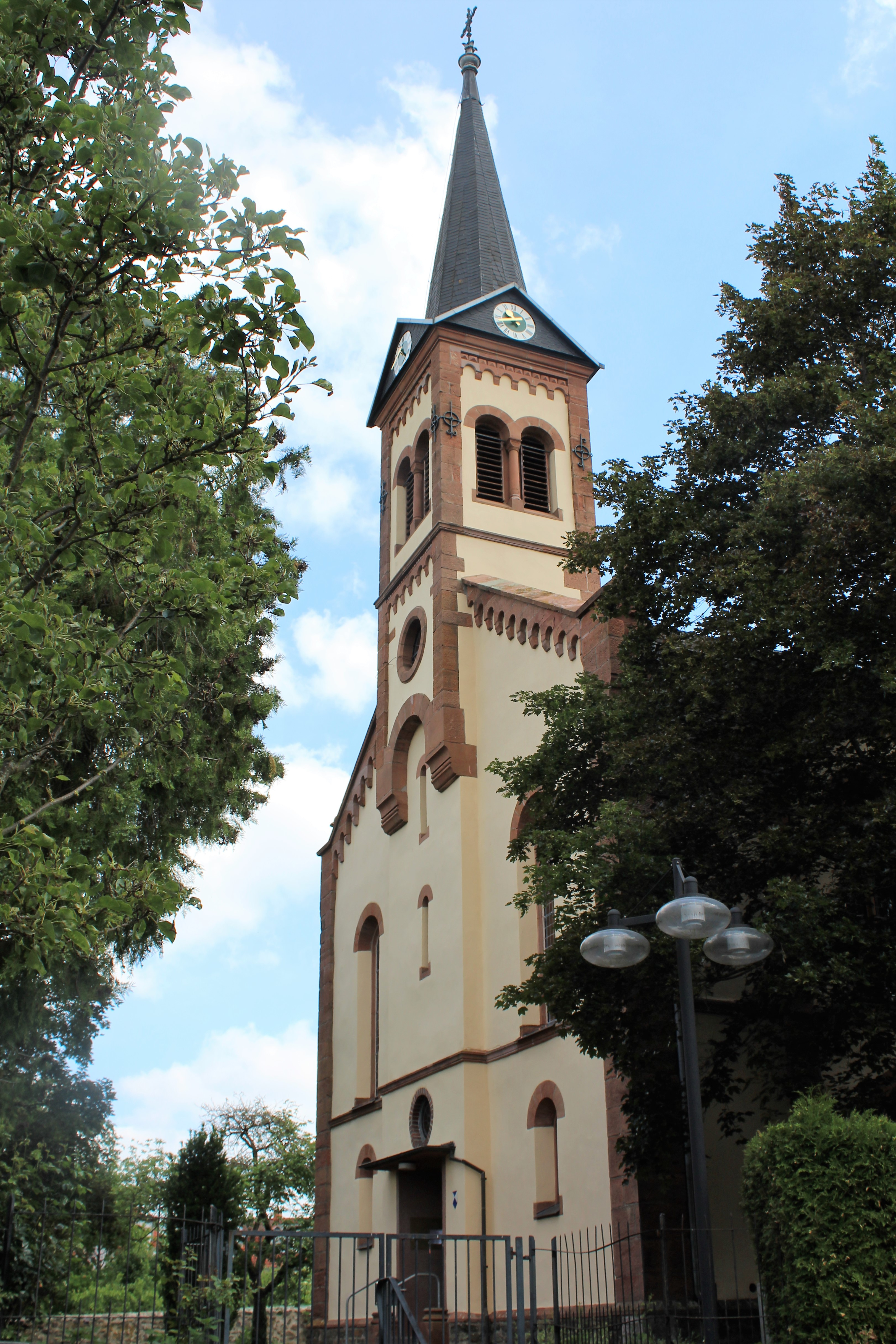 Ev. Kirche Garbenheim, Wetzlar, Lahn-Dill-Kreis, Hessen, Deutschland